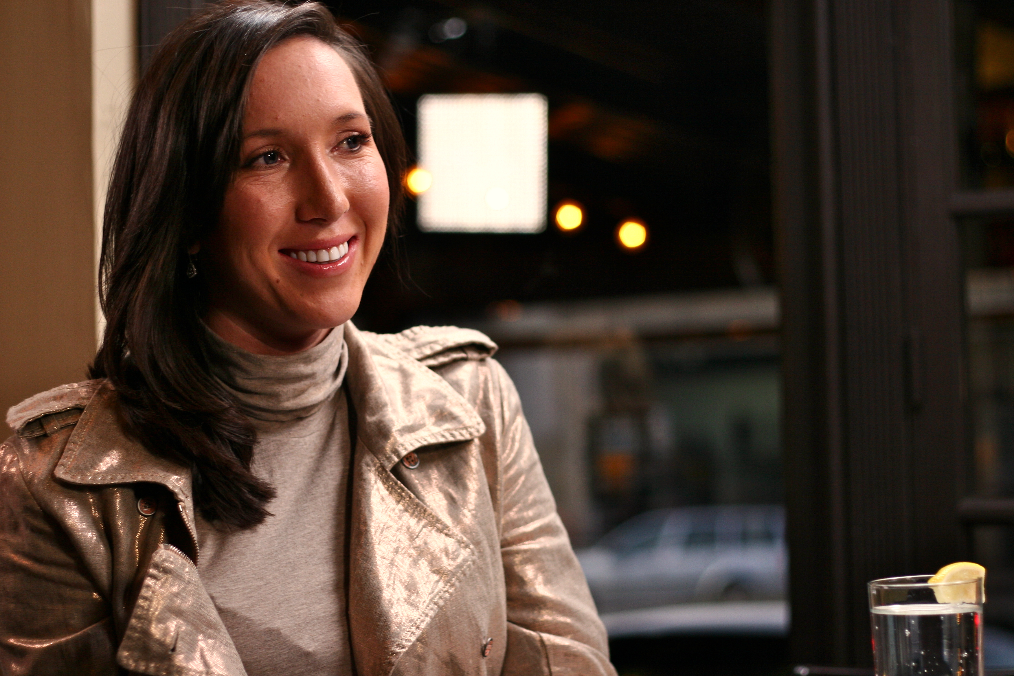 Jelena Jankovic